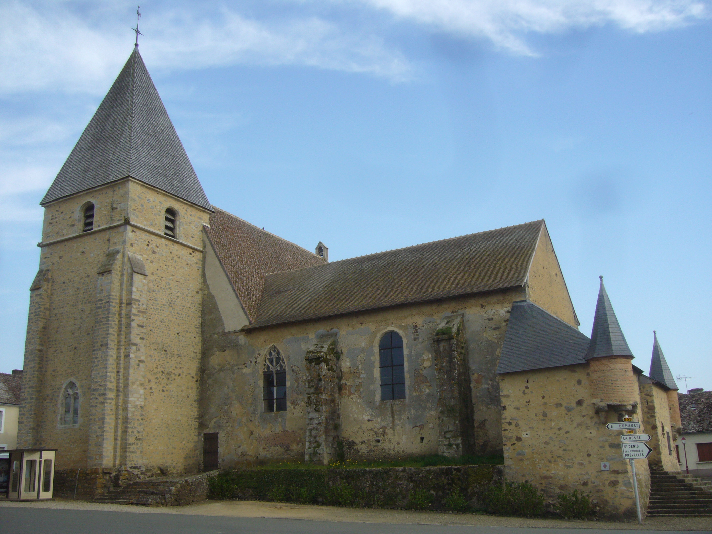 Église Saint-Georges de Saint-Georges-du-Rosay, dans la Sarthe. .